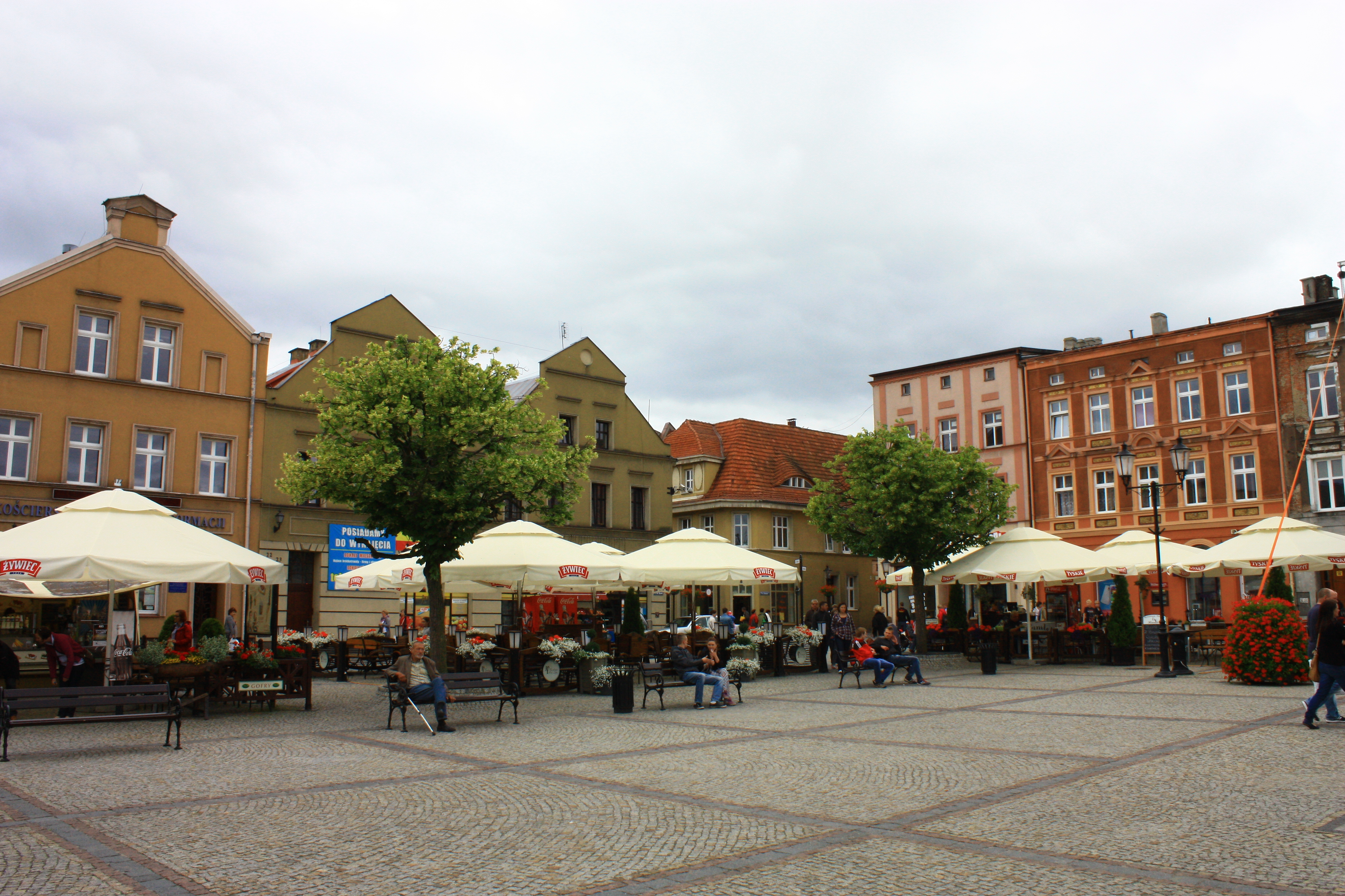 Kościerzyna - Rynek